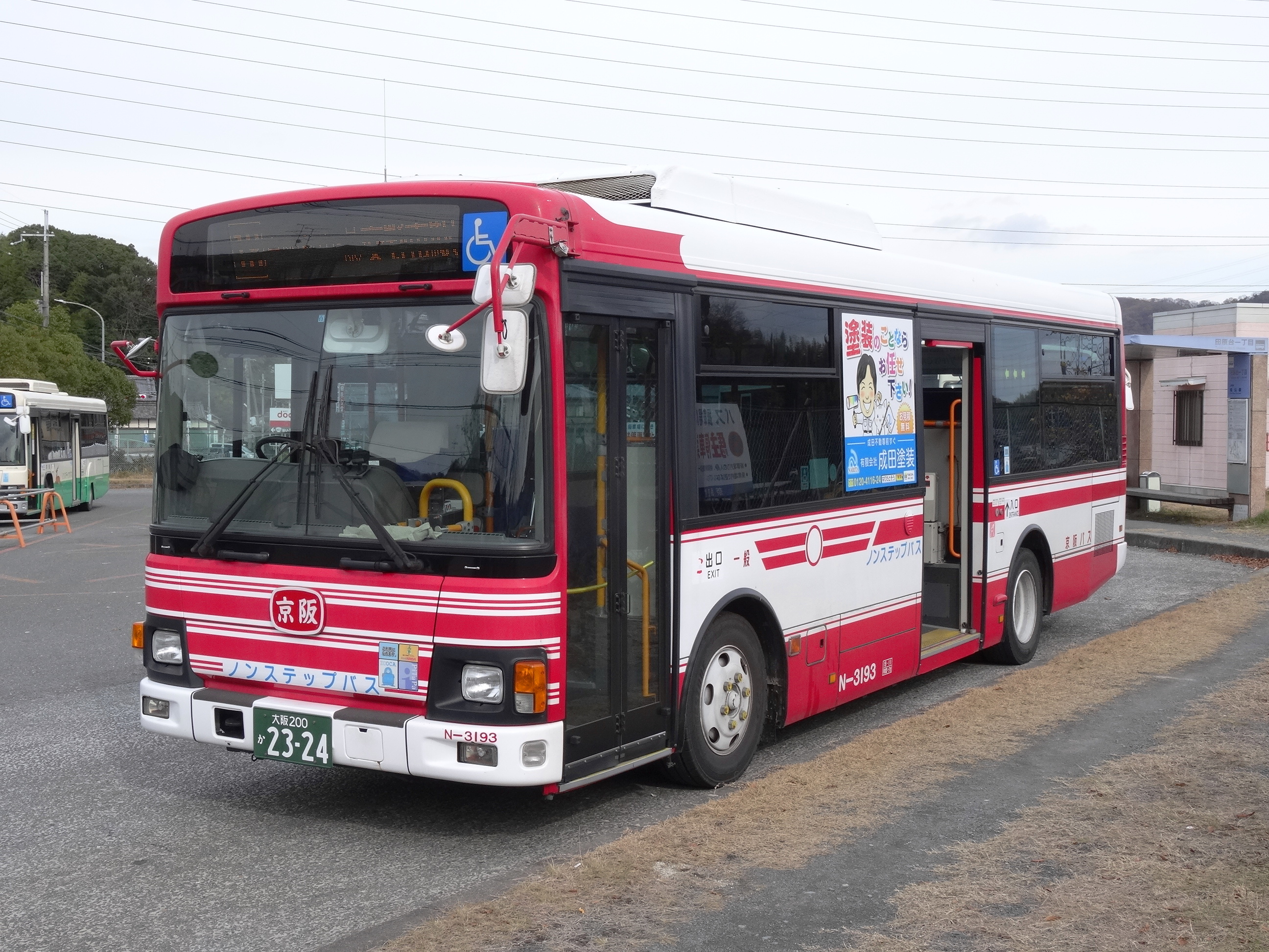 18 田原台一丁目→京阪交野市駅